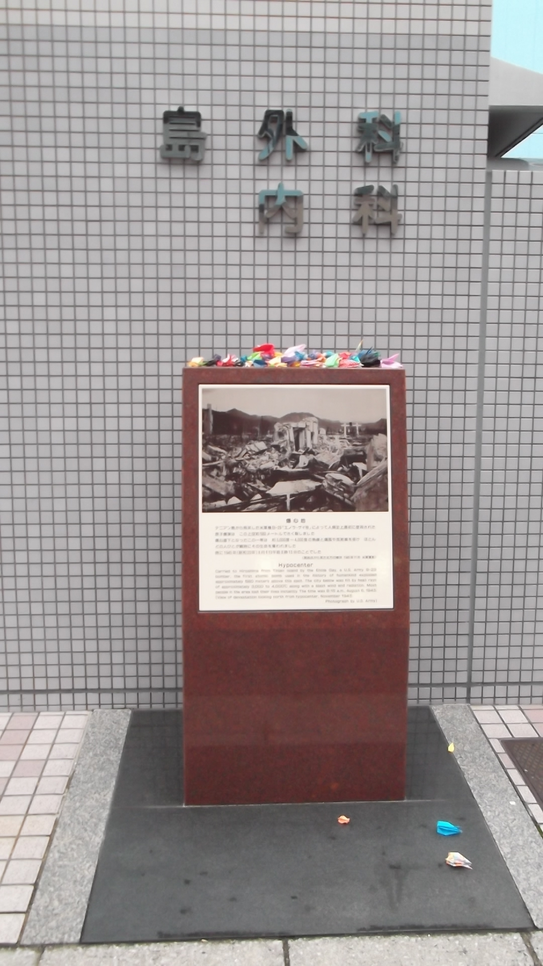 広島原爆の爆心地（当時は島病院）［広島市中区大手町一丁目5番25号］ 原爆ドームの東側にある島病院の上空約600メートルで原子爆弾が爆発した。